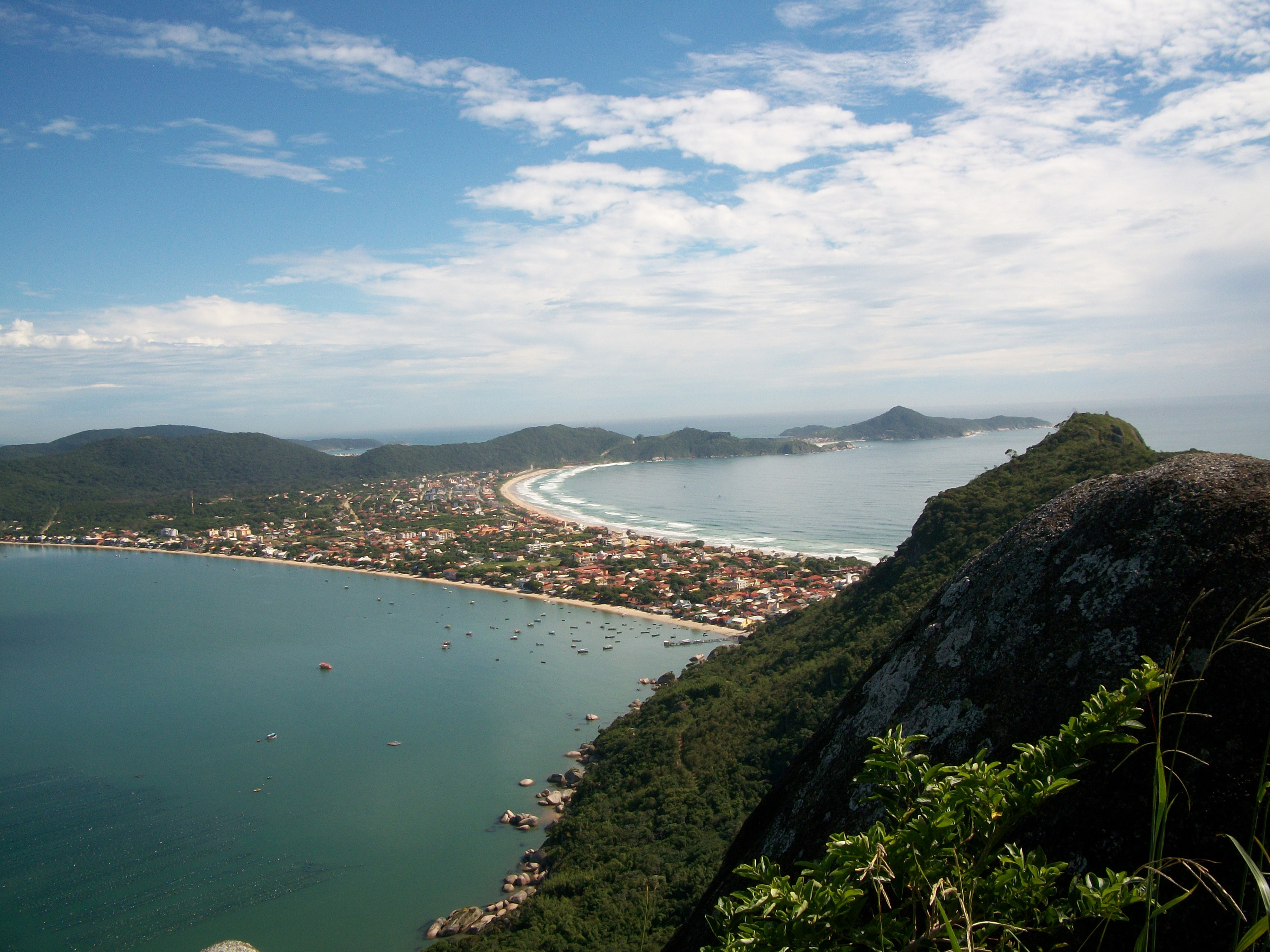 Playa de Brasil